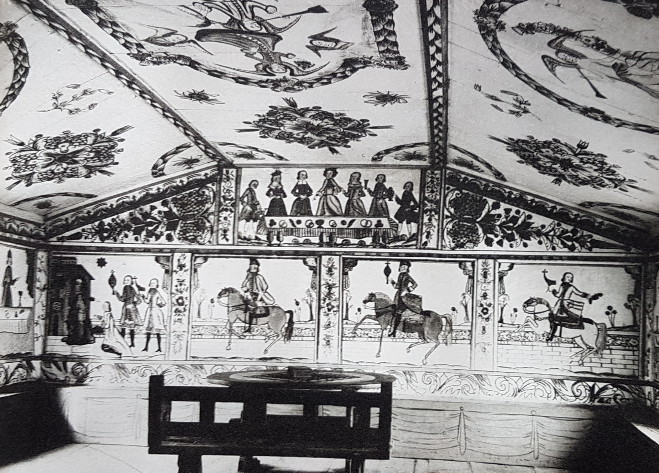 Dekormålningar i Gäststugan Norrgården utförda av Gustaf Reuter, avfotograferad bild från Allhems Svenskt konstnärslexikon.